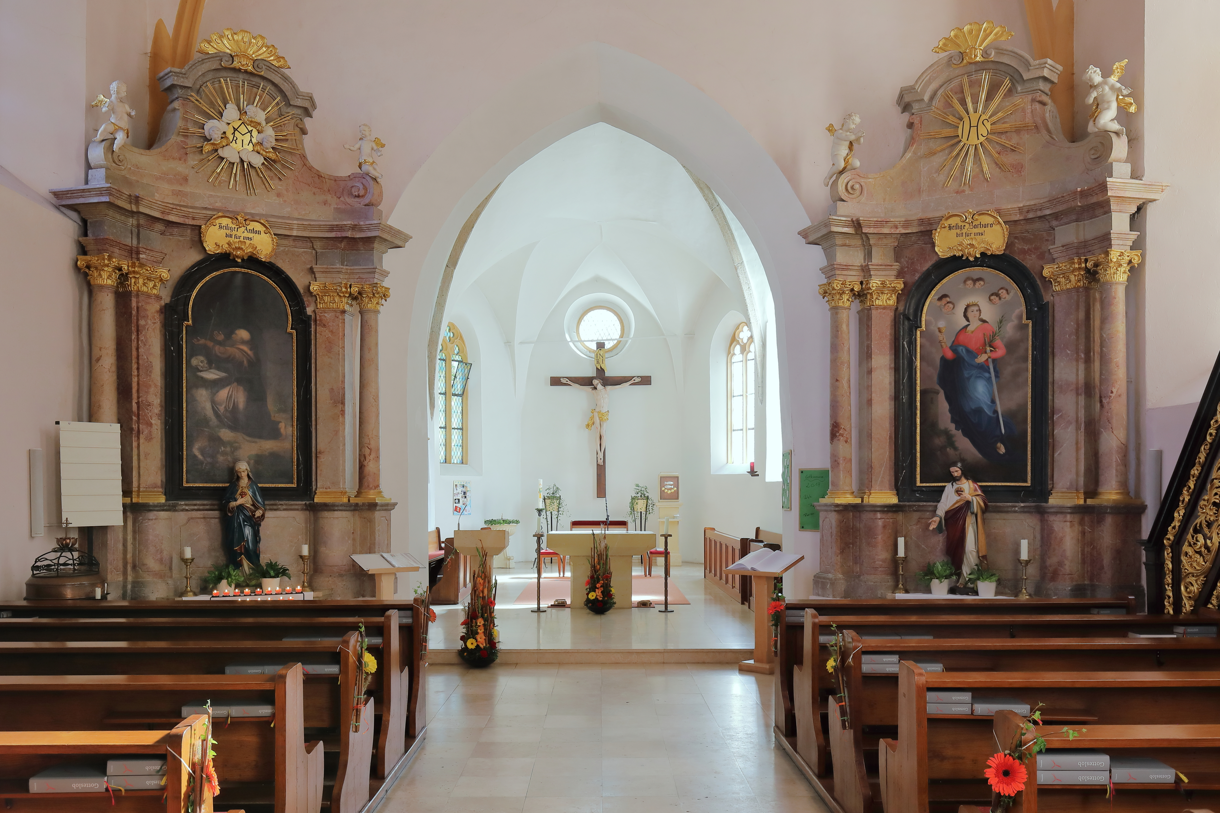 Innenansicht Richtung Hochaltar in der röm.-kath. Pfarrkirche hl. Ulrich in der niederösterreichischen Gemeinde Feistritz am Wechsel.Die spätgotische Wehrkirche hat eine vorwiegend barocke Einrichtung. 1972 wurde an der Chorsüdwand ein Fresko aus dem 2. Viertel des 14. Jahrhunderts freigelegt.